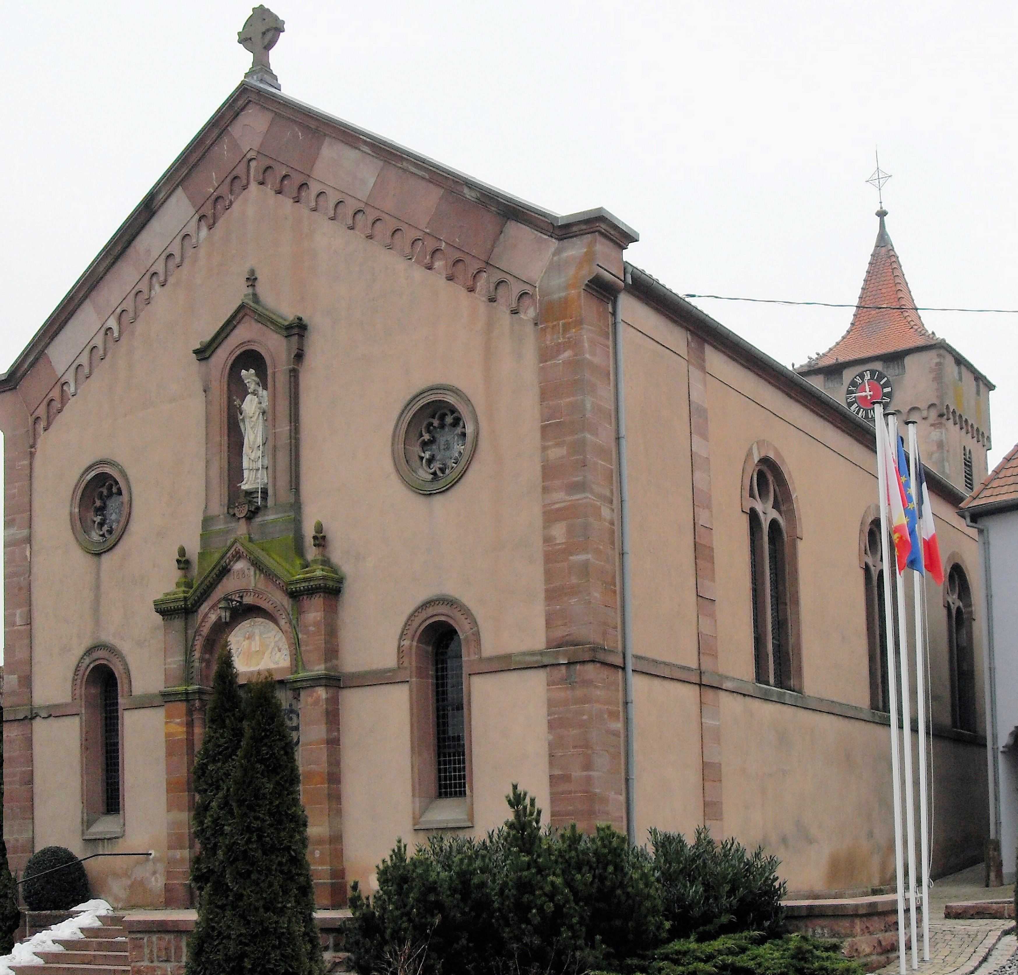 L'église Saint-Augustin à Crastatt